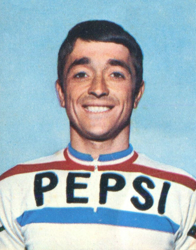 Figurina/Sticker CAMPIONI DELLO SPORT 1968/69 - n. 183 - DANCELLI -ITA-New